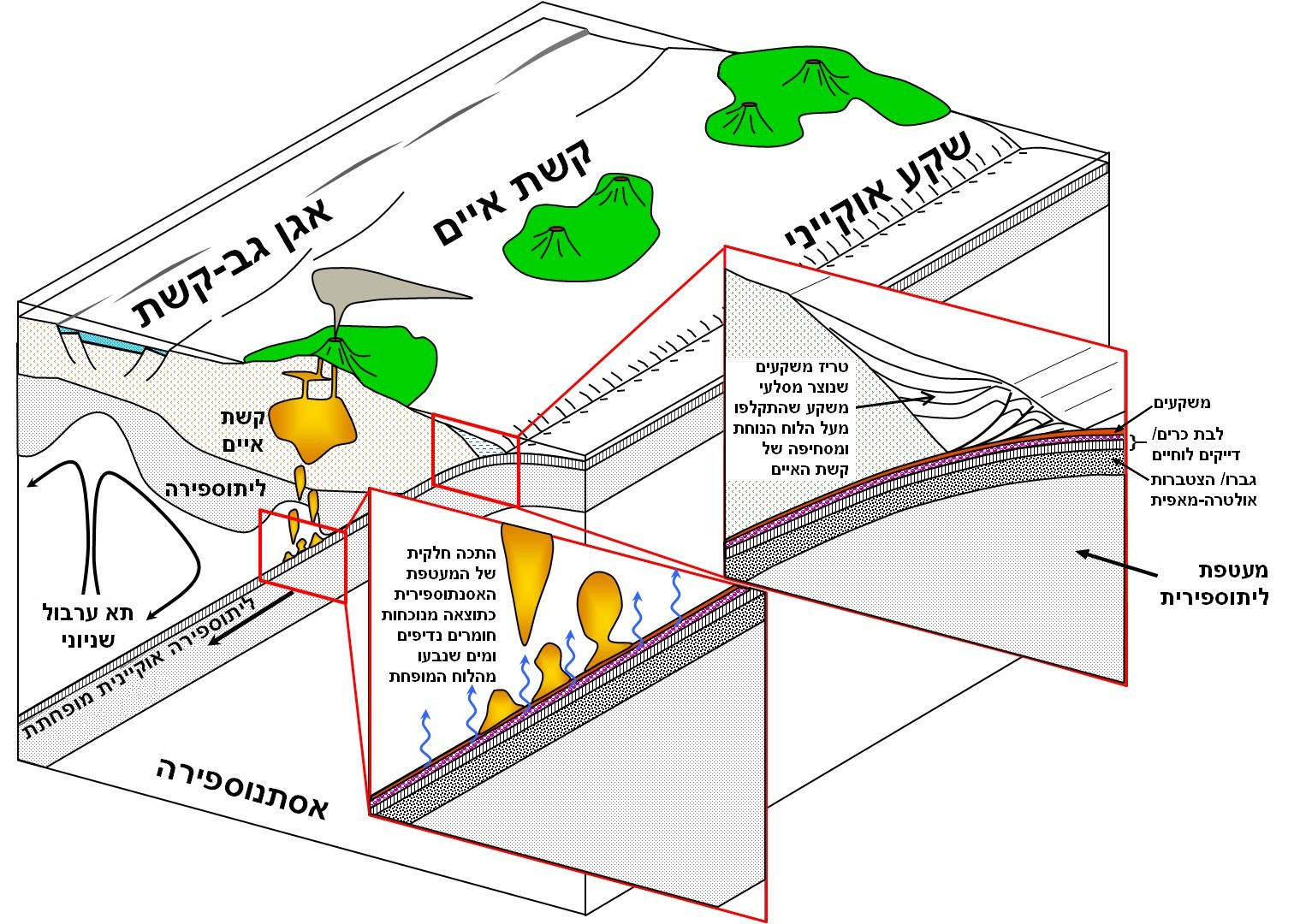 מבנה אזור הפחתה והתהליכים המתרחשים בו